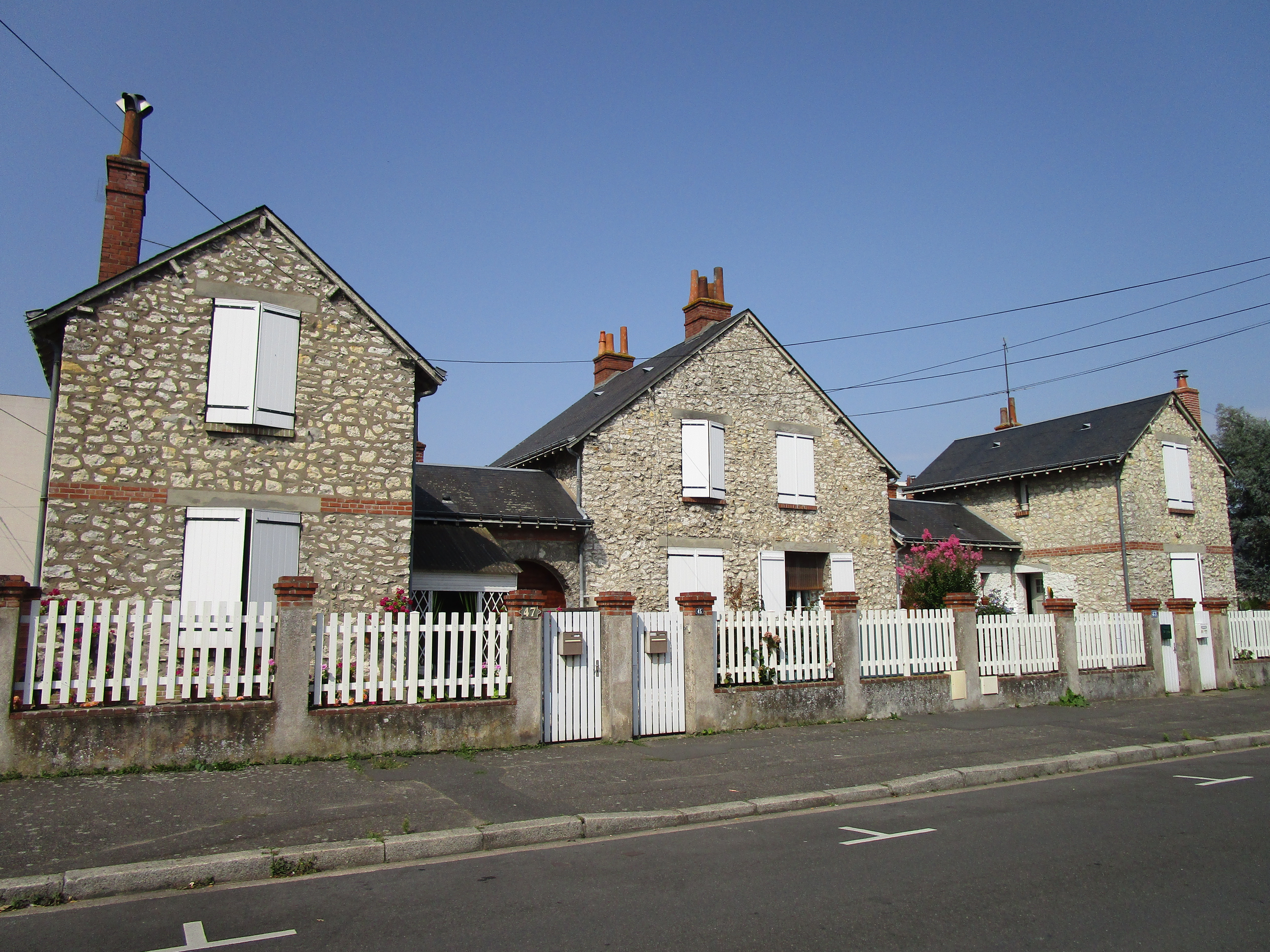 Maisons de la cité ouvrière du Général-Renault, dans le quartier Giraudeau de Tours.